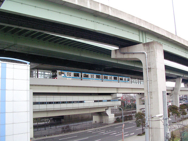 フェリーターミナル駅外観（連絡通路より） 2006年2月21日撮影